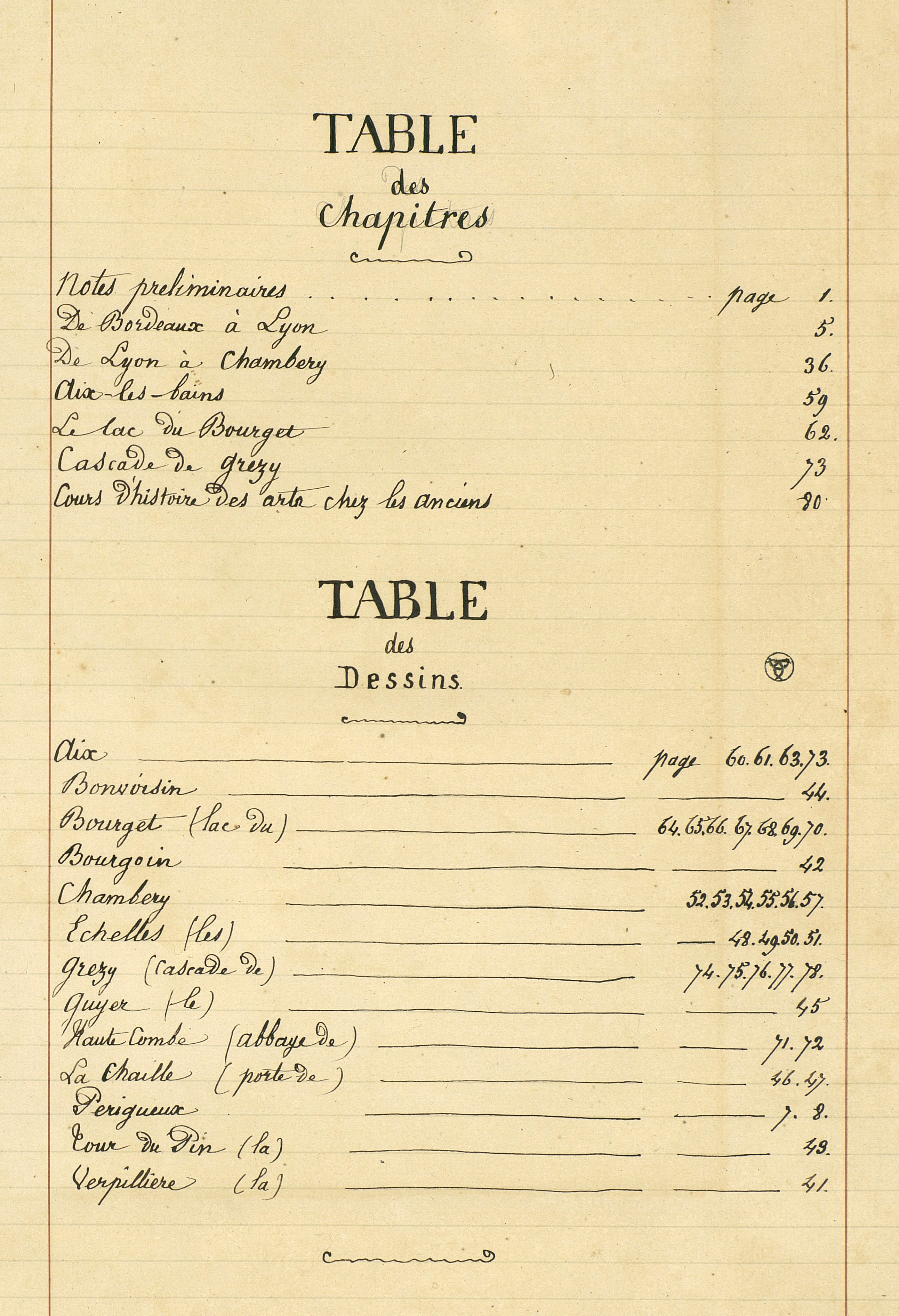 Voyage à Rome fait en 1824 et 1825, par Pierre Lacour fils ː table des chapitres et des illustrations.